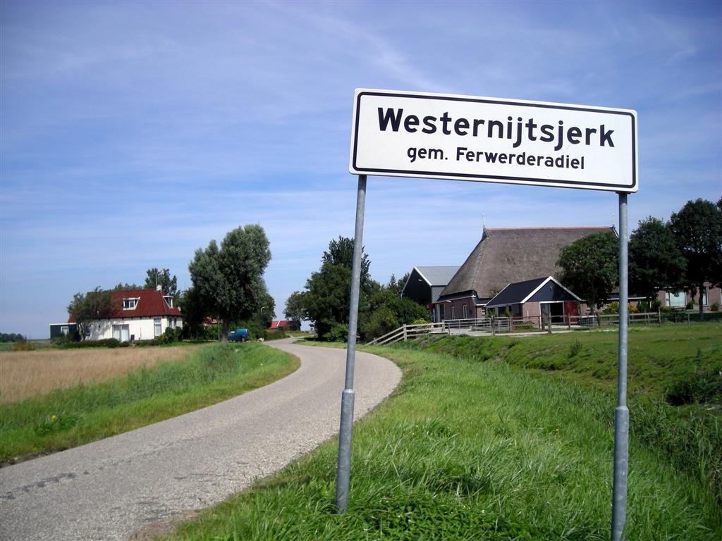 Westernijtsjerk